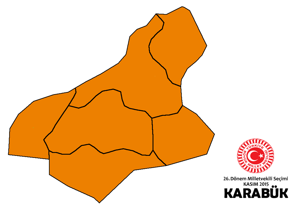 Kasım 2015 seçimleri